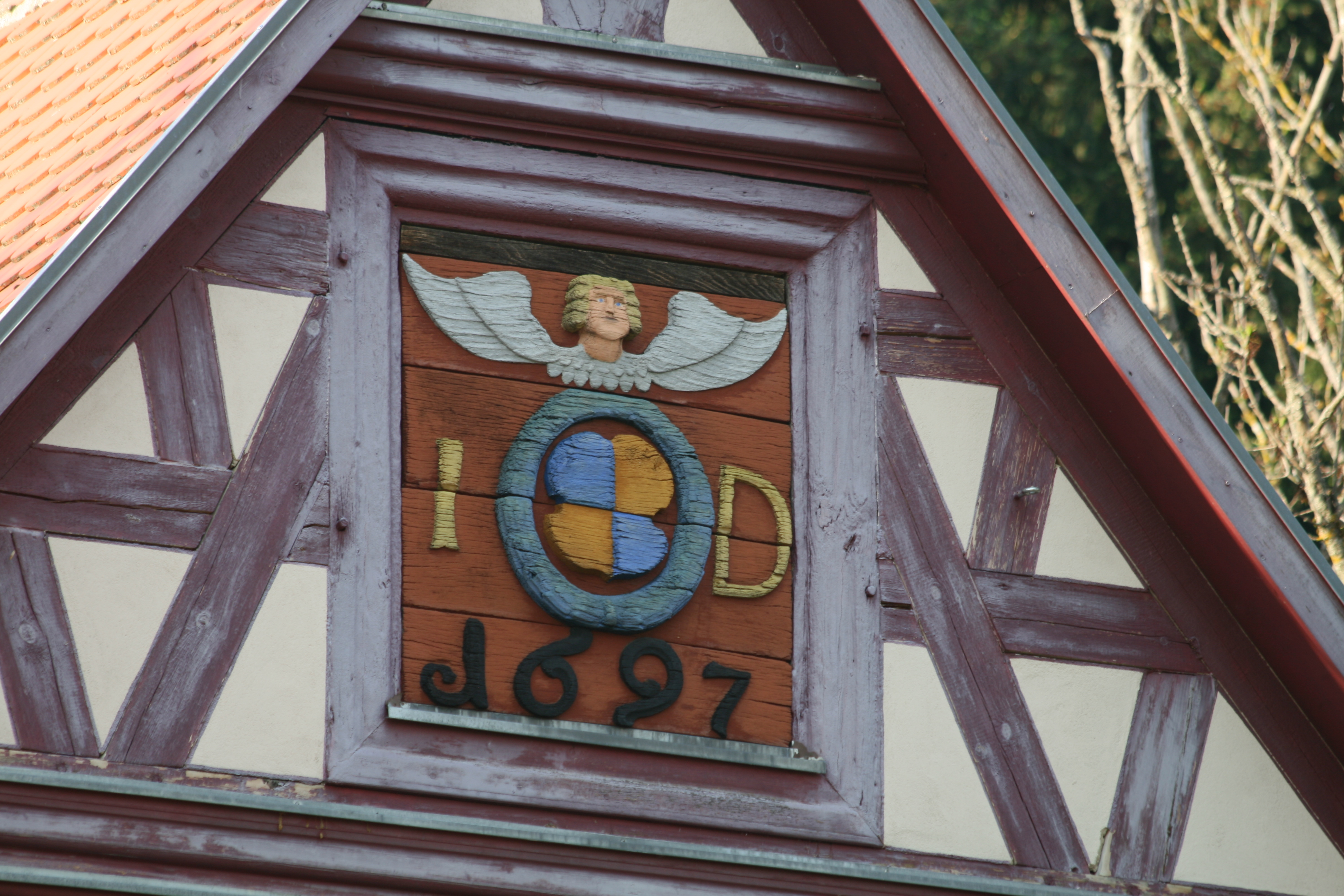 Wappen am Giebel des Mühlengebäudes